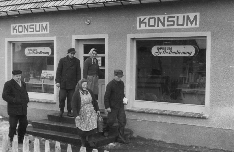 Zentralbild / Weigelt / 14.6.1960 [Herausgabedatum] / Landhandel wird ständig verbessert Moderne Selbstbedienungsläden sind heute auf dem Lande keine Seltenheit mehr und erleichtern den Frauen wesentlich den Einkauf. Bereits 340 Selbstbedienungs-Verkaufstellen gibt es z. Zt. allein im Bezirk Neubrandenburg - davon viele in kleinen Orten und Dörfern. UBz: In dem kleinen mecklenburgischen Dorf Kruckow im Kreis Demmin, hat die Konsumgenossenschaft einen neuen Selbstbedienungsladen eröffnet.